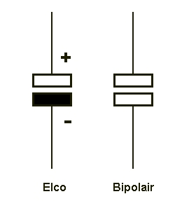 Door de auteur zelf vervaardigde afbeelding.